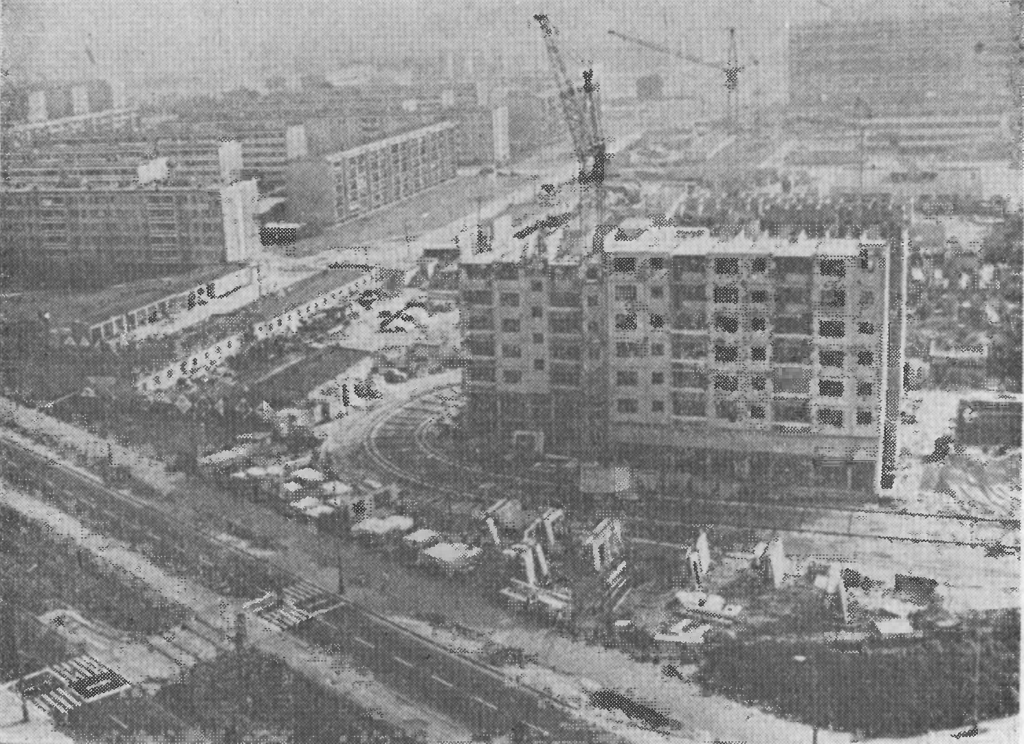 os. Rzeczypospolitej budynek nr 1-2 (16-kond.) - 9 września 1977